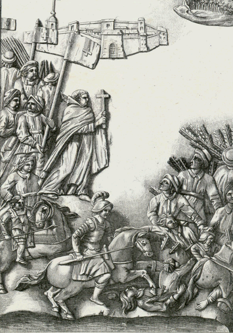 Bataille de Muret